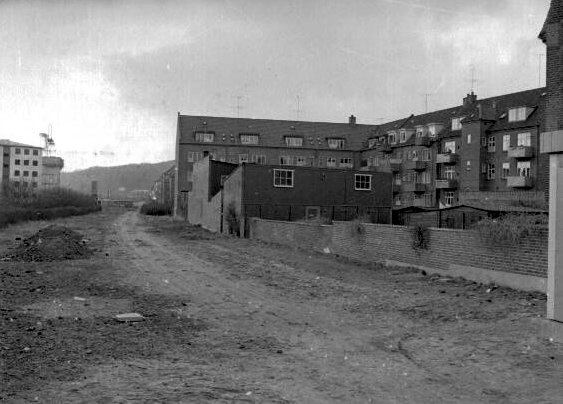 Svendsgade, Vejle. 3 baggårde sammen med linieføringen til den tidligere jernbane: Vejle-Vandel-Grindsted Jernbane (VVGJ). Ulrik Gräs voksede op i nr.3 - og kuriøst nok kan man på billedet se Ulriks mor på altanen (eller en skygge af hende).